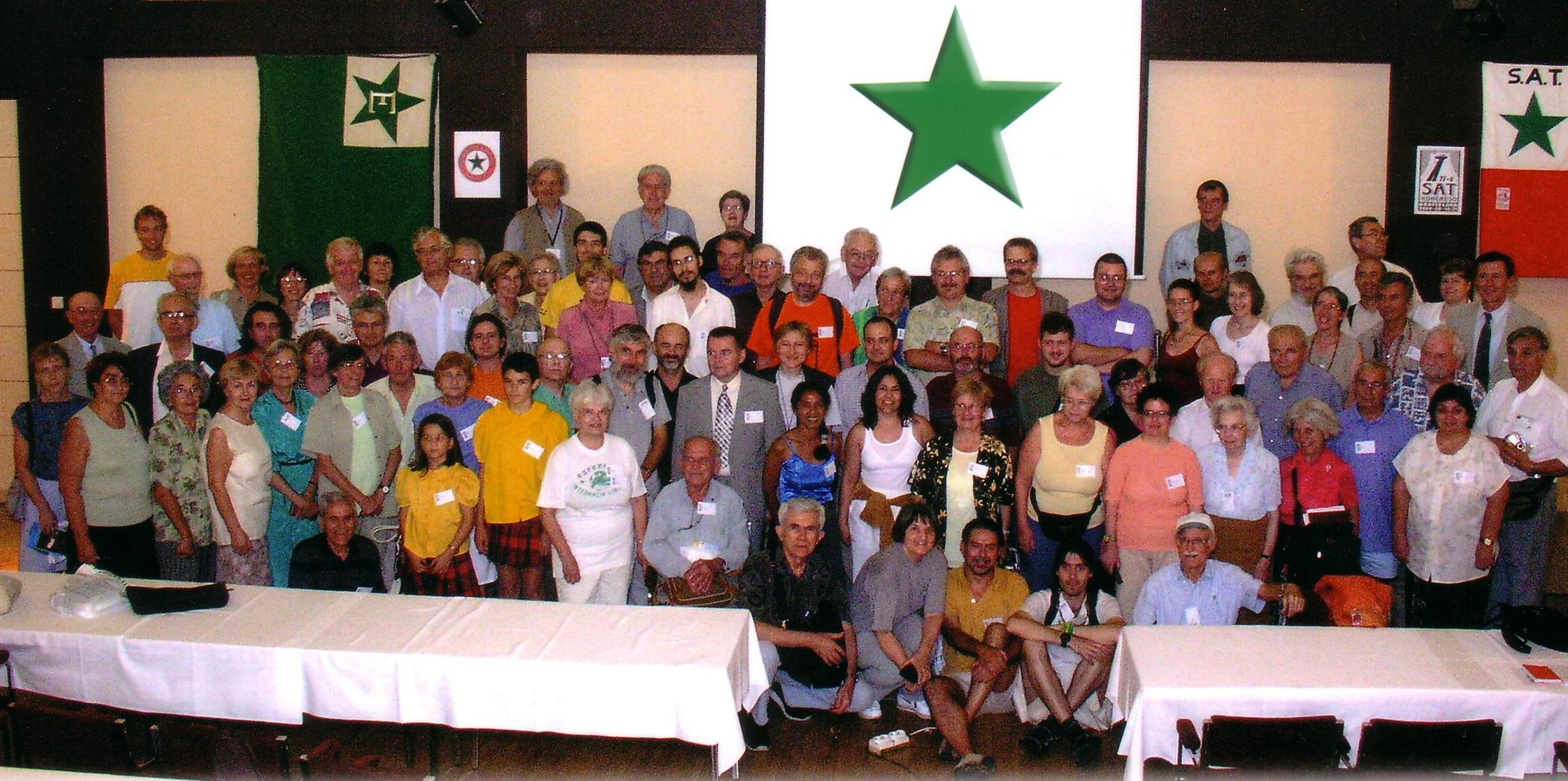 77-a SAT-Kongreso 2004 en Bratislavo.